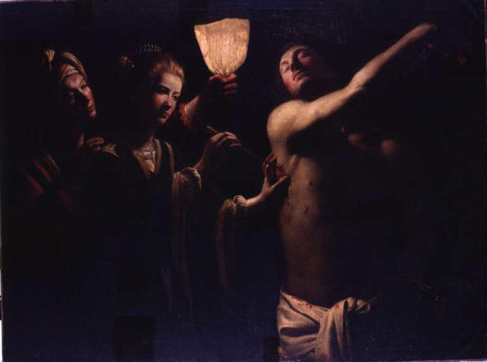 Dénomination tableau Auteur/exécutant BIGOT Trophime, Maître à la Chandelle(dit) Titre saint Sébastien soigné par Irène Période création/exécution 1ère moitié 17e siècle Lieu de conservation Bordeaux ; musée des beaux-arts Numéro d'inventaire BX 1966.7.1